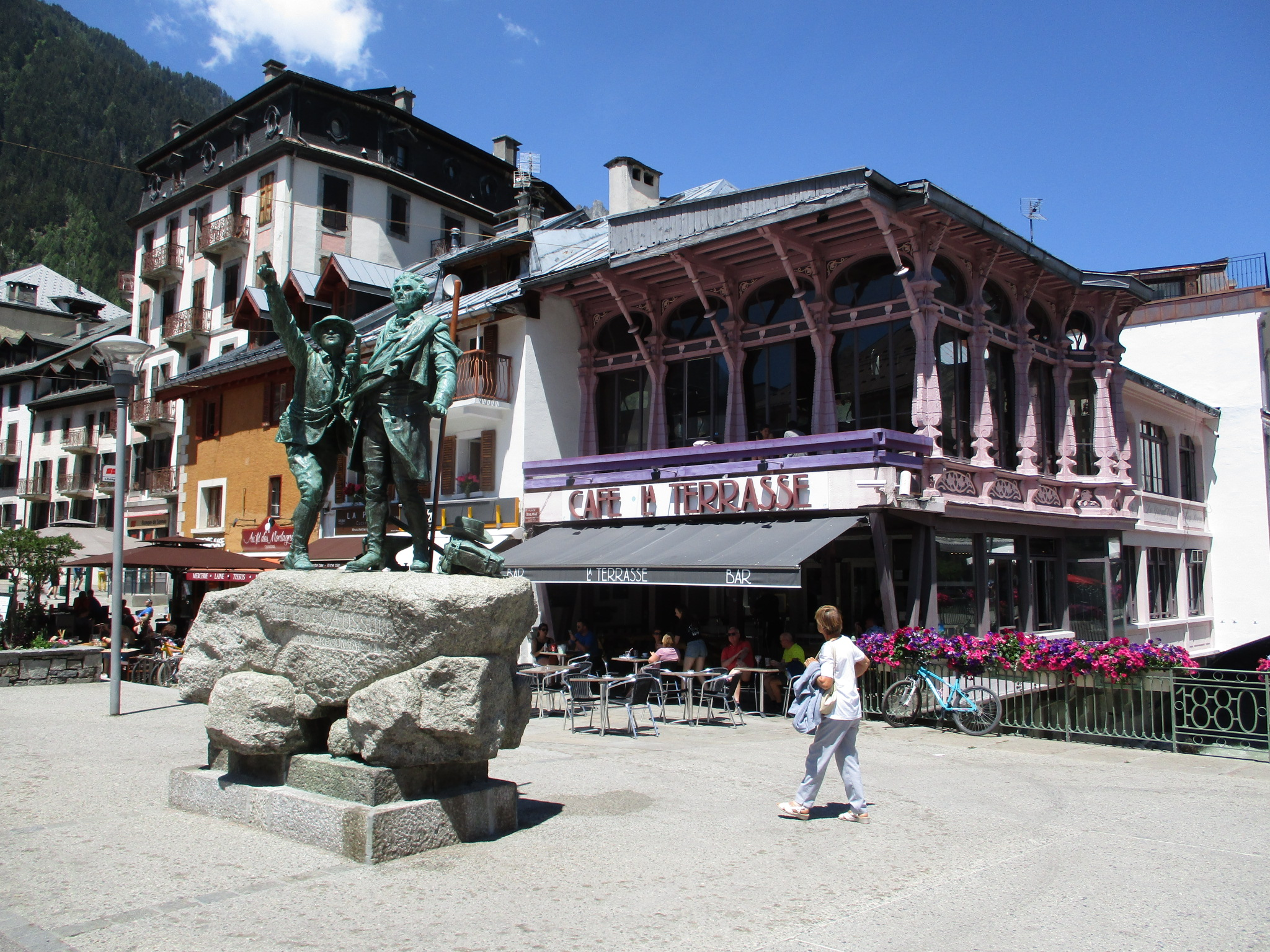 Streets in Chamonix